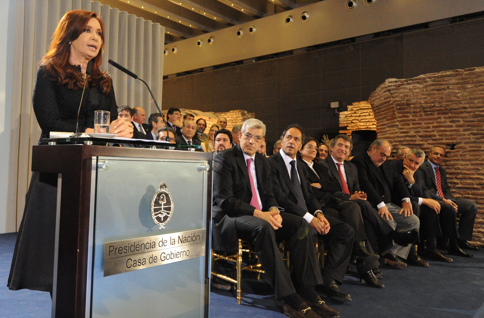 Cristina Fernández de Kirchner lanza el Bicentenario.